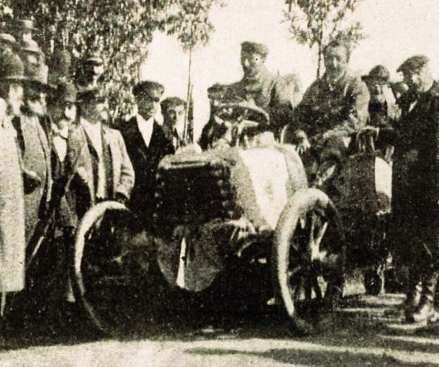 Fernand Charron vainqueur de Paris-Bordeaux 1899 - La Vie au Grand Air du 4 juin 1899, p.449